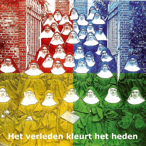 Het verleden kleurt het heden !